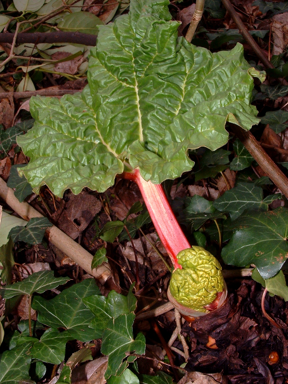 rhubarbe Mar 8, 2008 #222